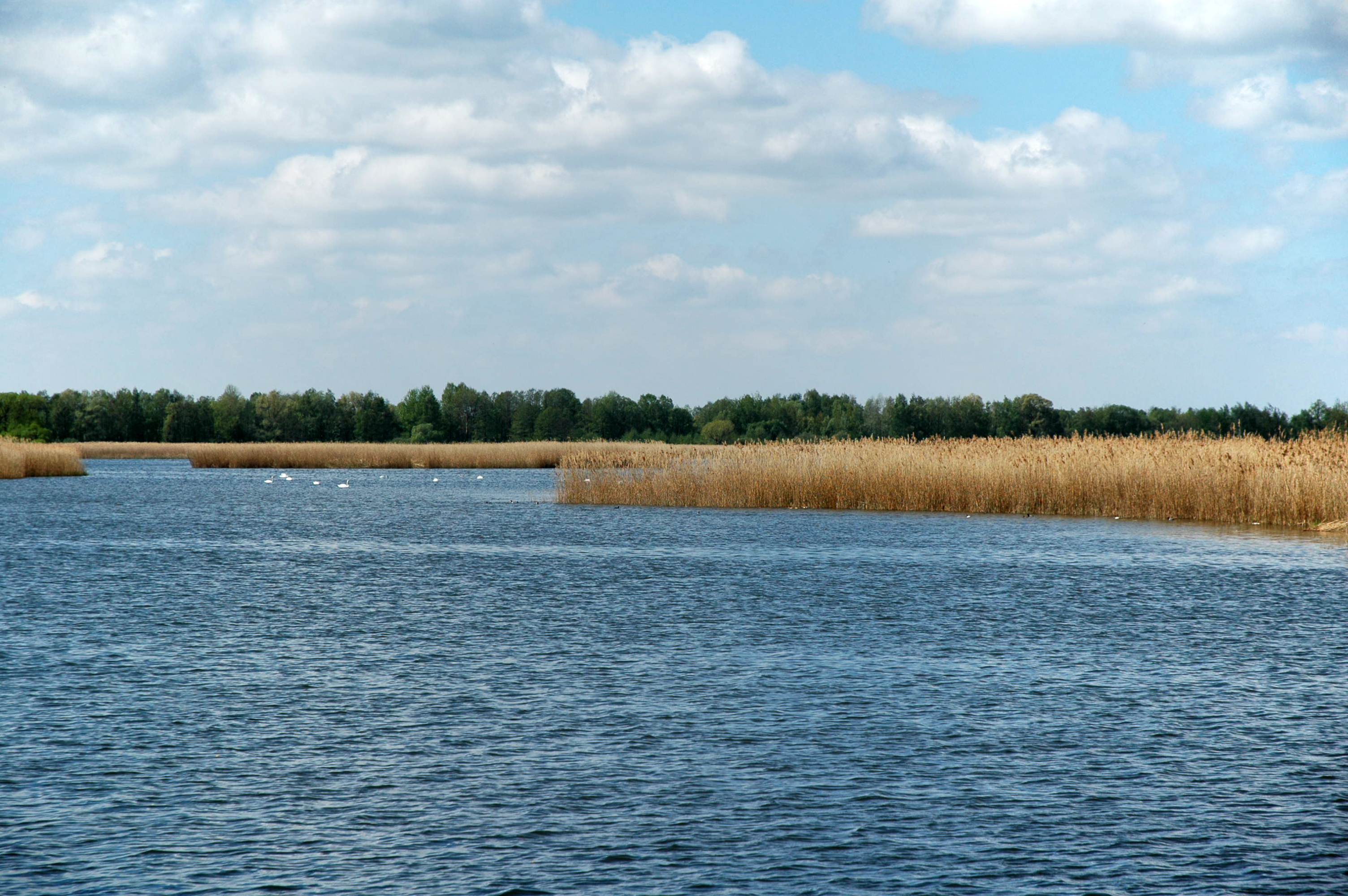 Poland, Milicz - Ponds of Milicz (Stawy Milickie), Staw Słoneczny Górny